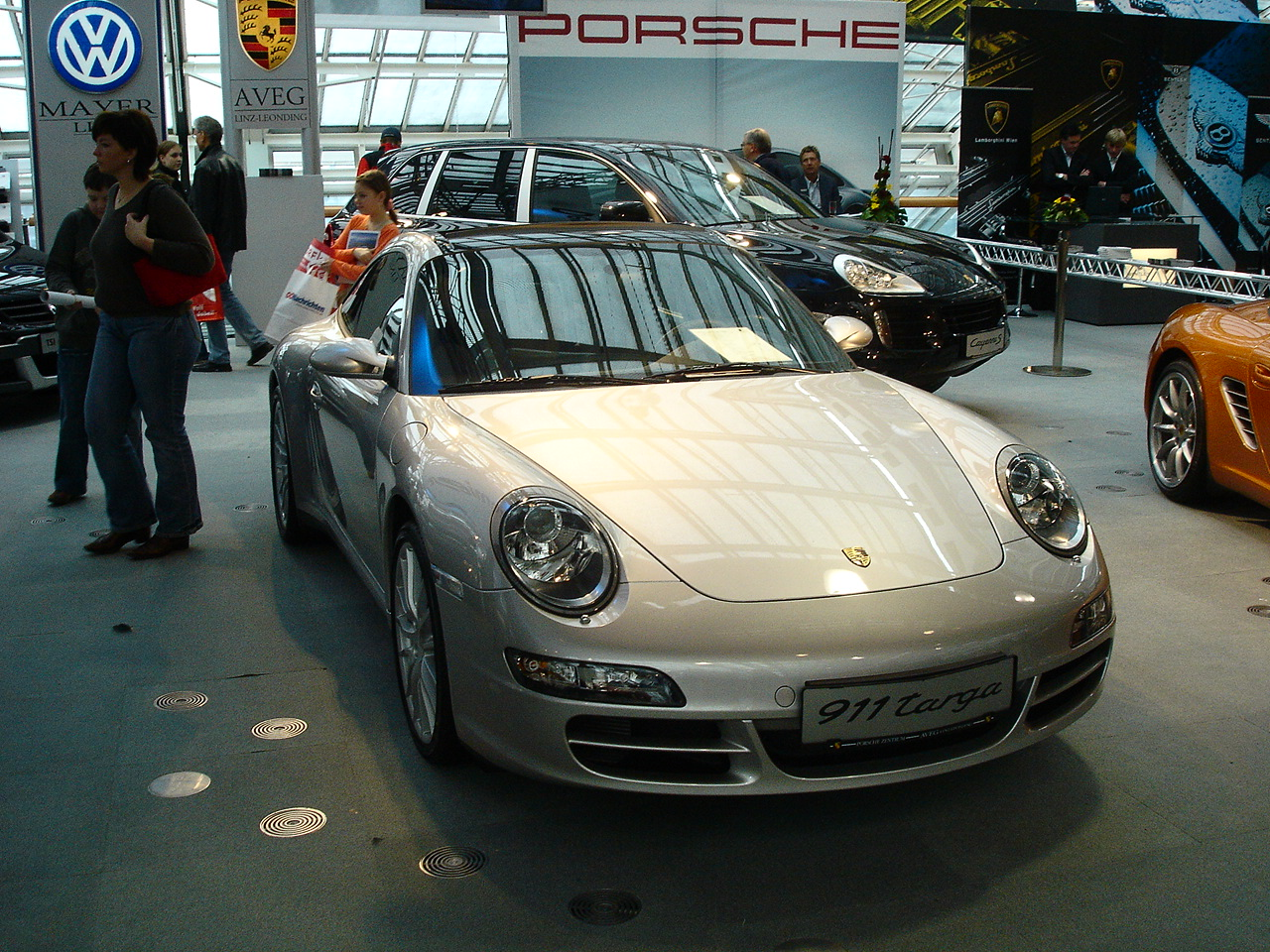 Porsche 911 Targa (997)